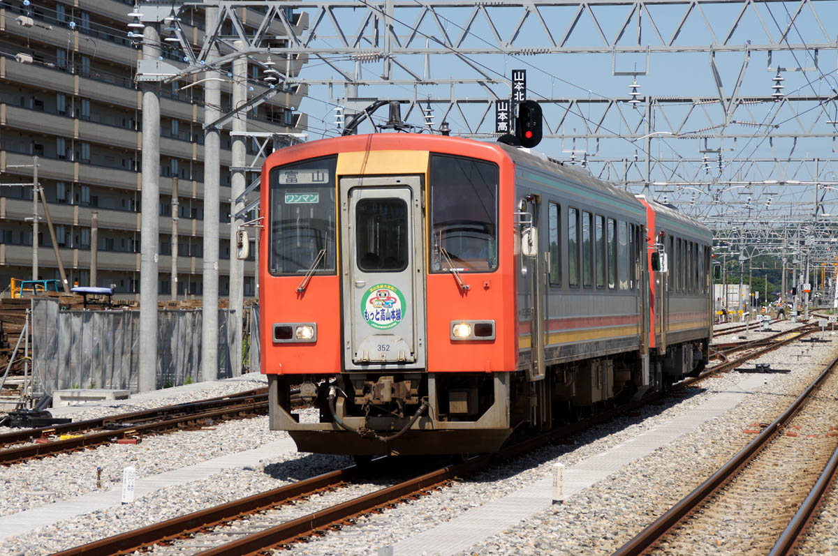 JR西日本キハ120形（富山地域鉄道部）